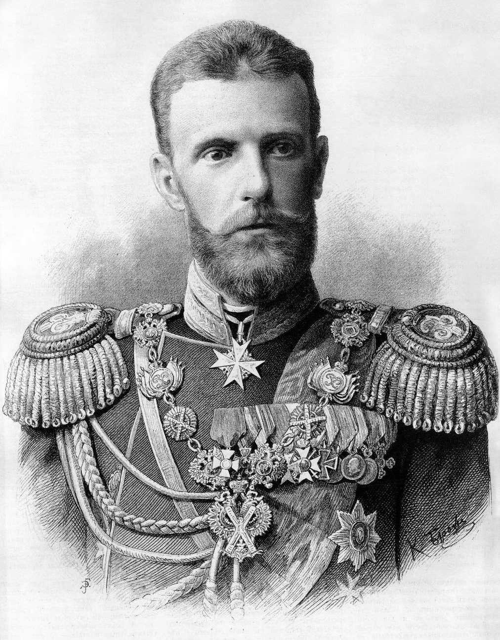 Великий князь Сергей Александрович в 1890-е годы.